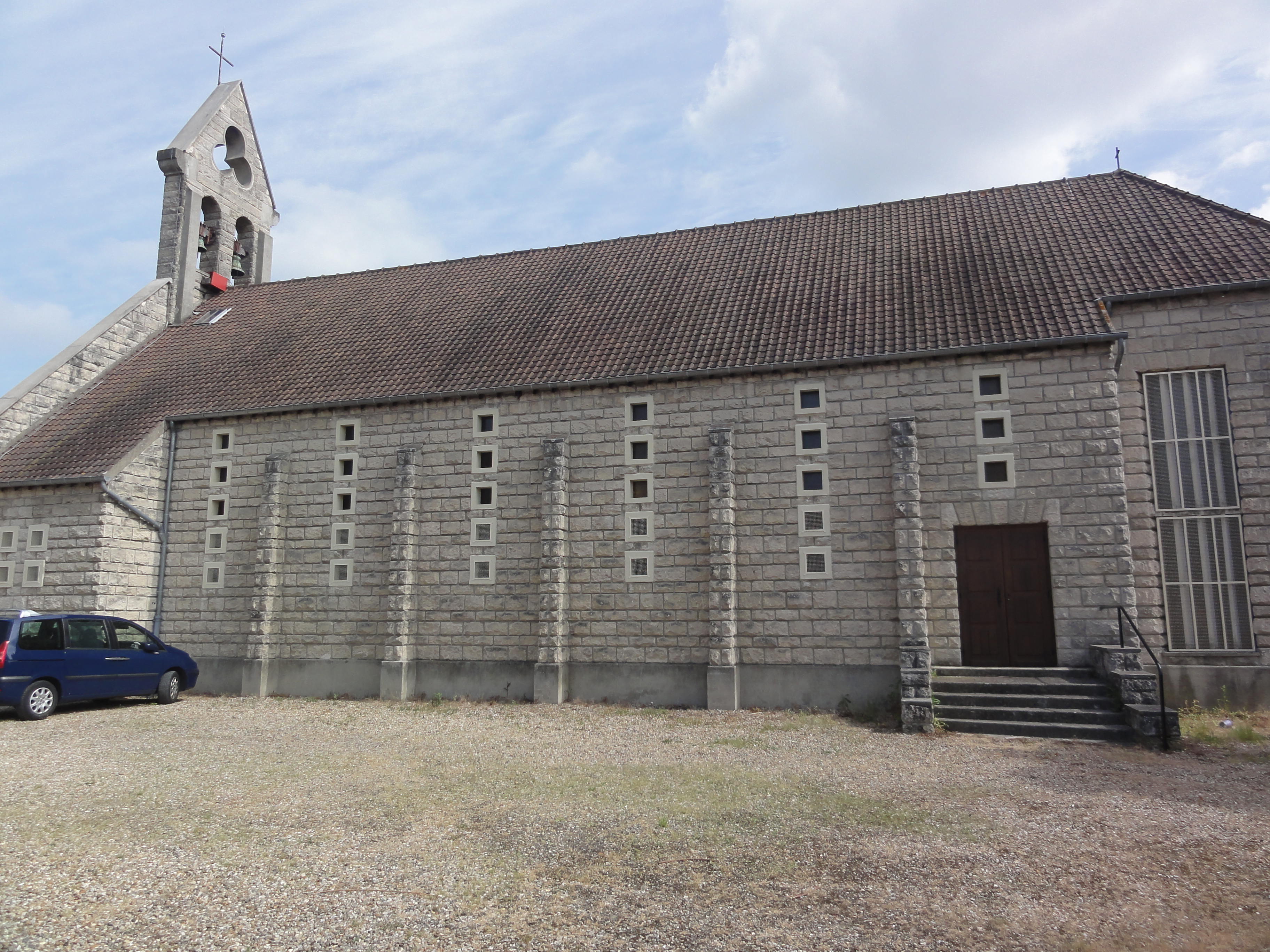 Butry-sur-Oise (Val-d'Oise) Église